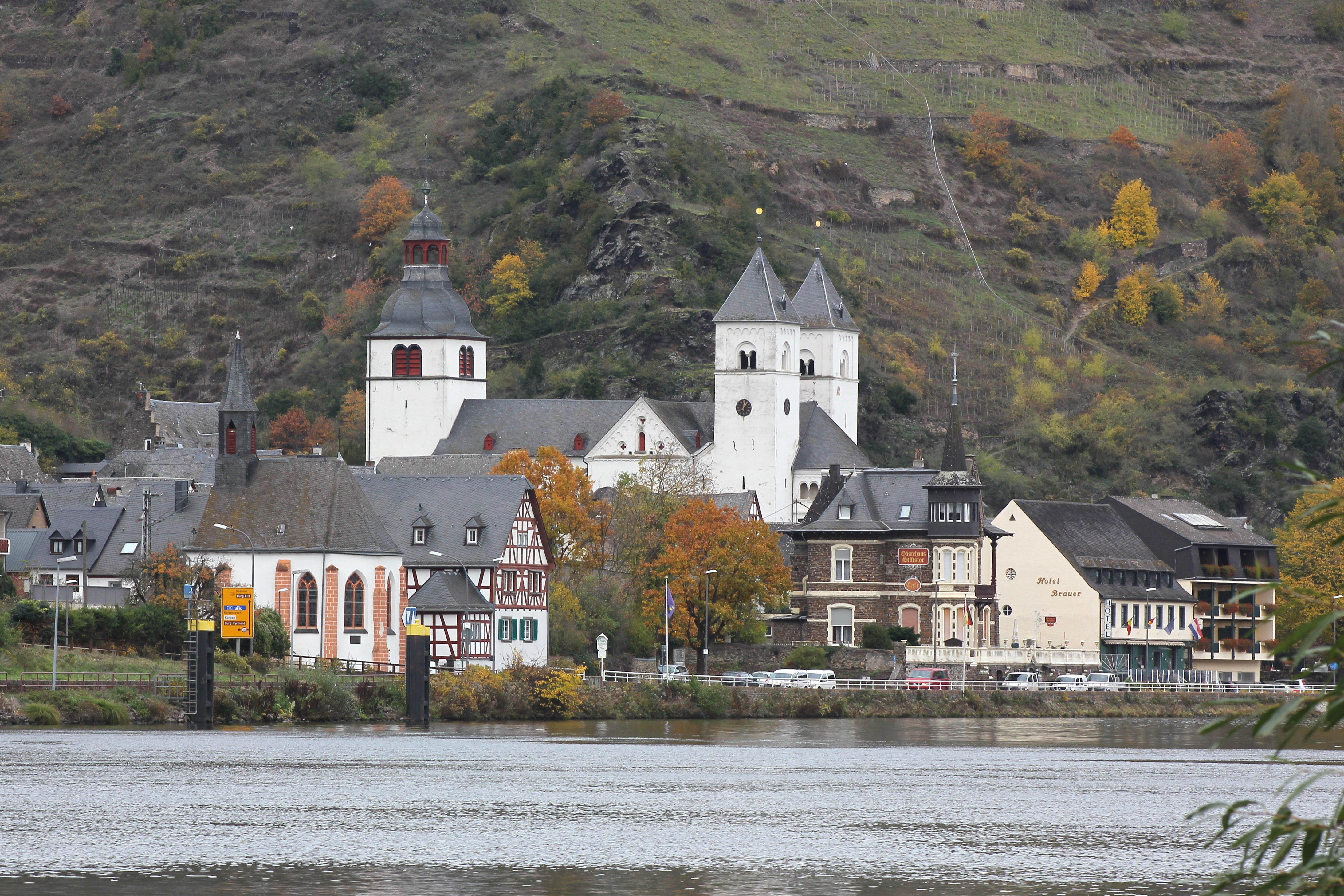 Karden an der Mosel, Blick von Südosten auf die Georgskapelle, das Wohnhaus Moselstraße 32, die Stiftskirche St. Castor und die Villa Cornely (heute „Gästehaus Stiftstor“), Moselstraße 27